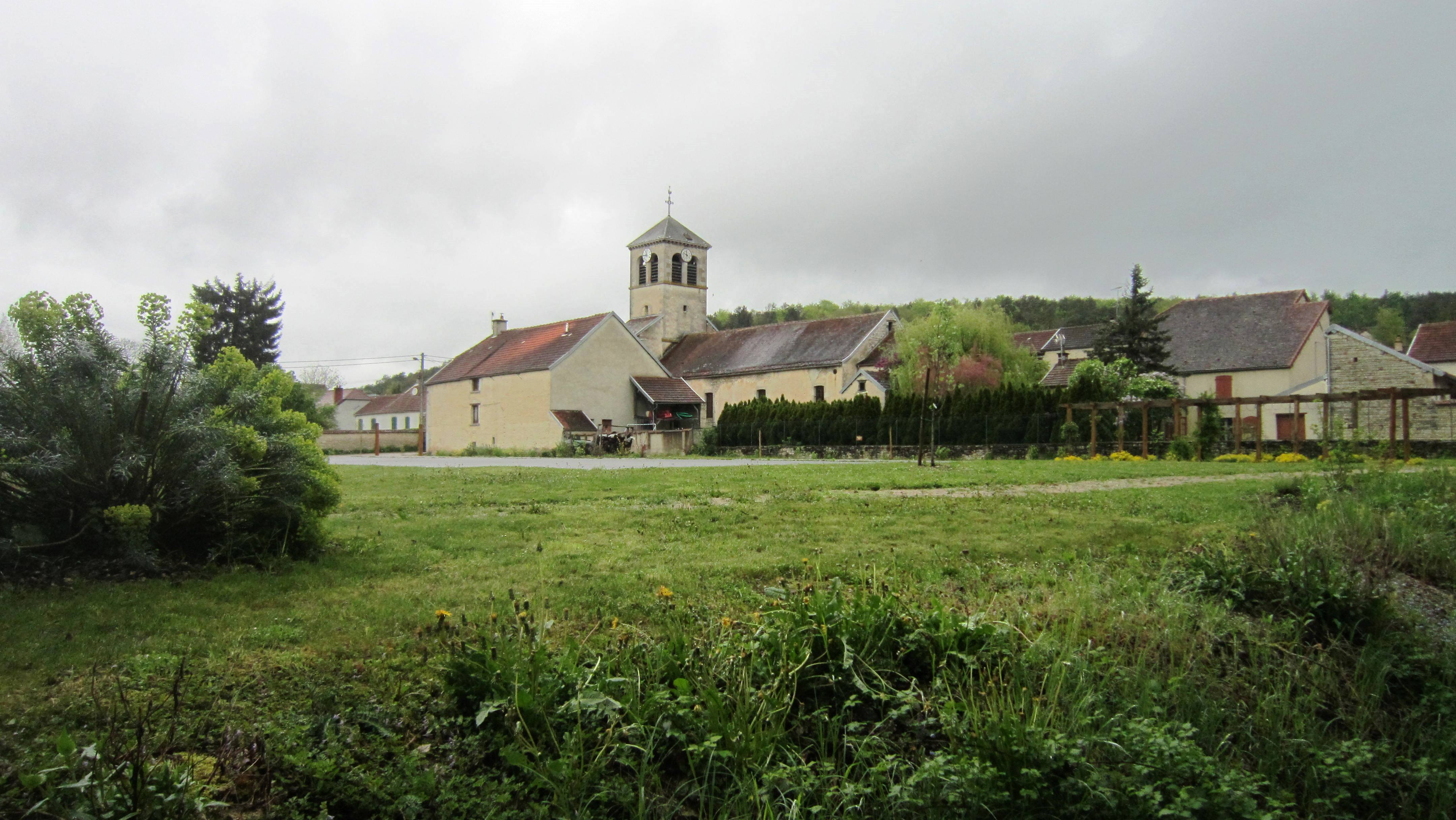 Chaumont-le-Bois (Côte-d'Or)